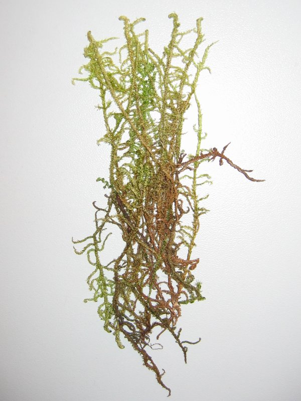 Glänzender Krückstock (Drepanocladus vernicosus)